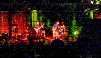 Salamandra. Rock paraguayo. Estación del Ferrocarril. Asunción 2007